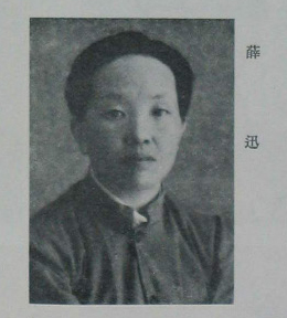 中國人民政治協商會議第一屆全體會議代表